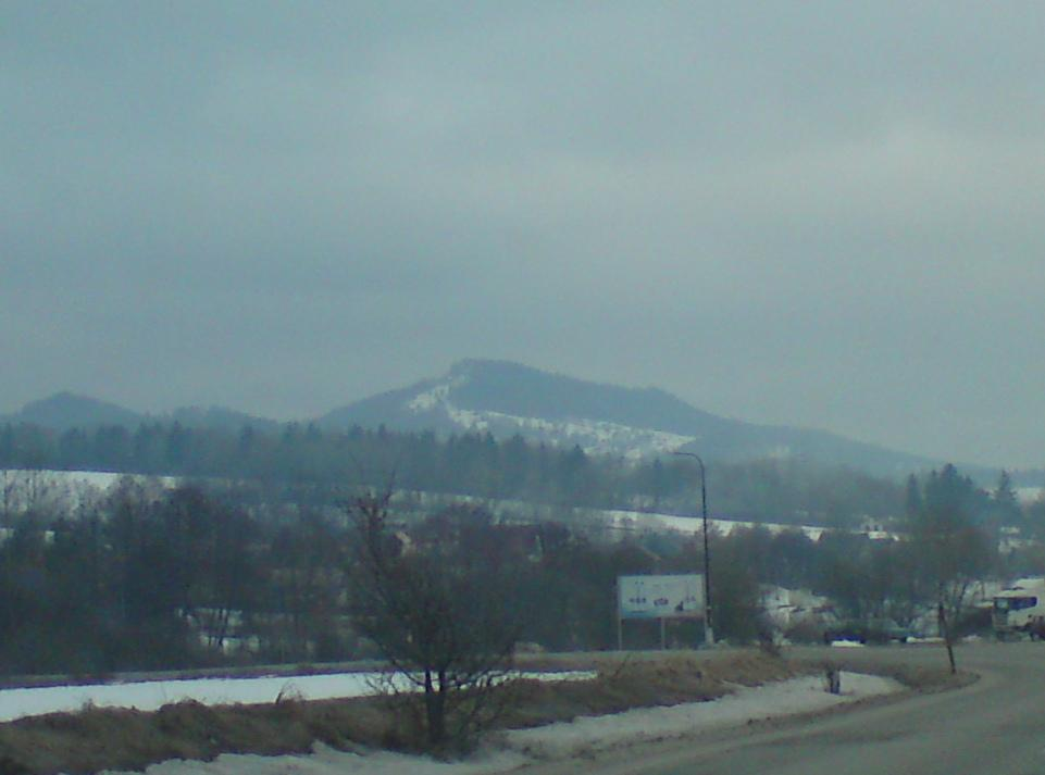 Vysehrad od Duboveho